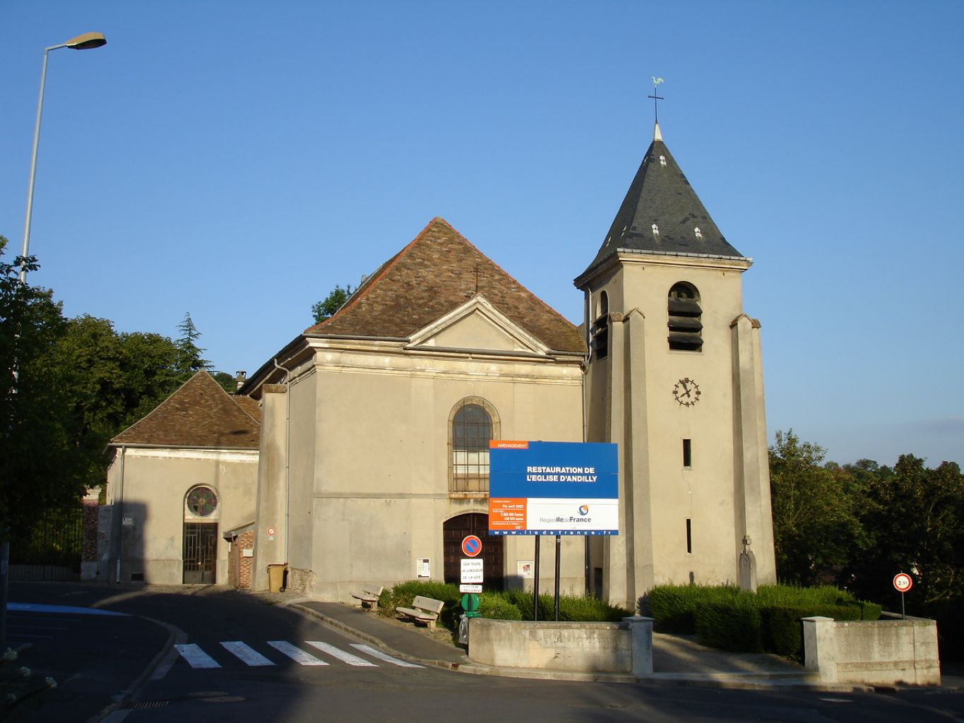 Église d'Andilly, Val-d'Oise (France) - Août 2005 Photo personnelle de clicsouris